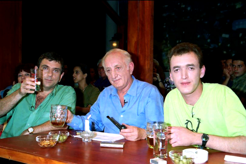 שלום אסייג ודודו דותן אורחים בתכניתו של יעקב (יענקלה) אגמון "בירה ומצב רוח"